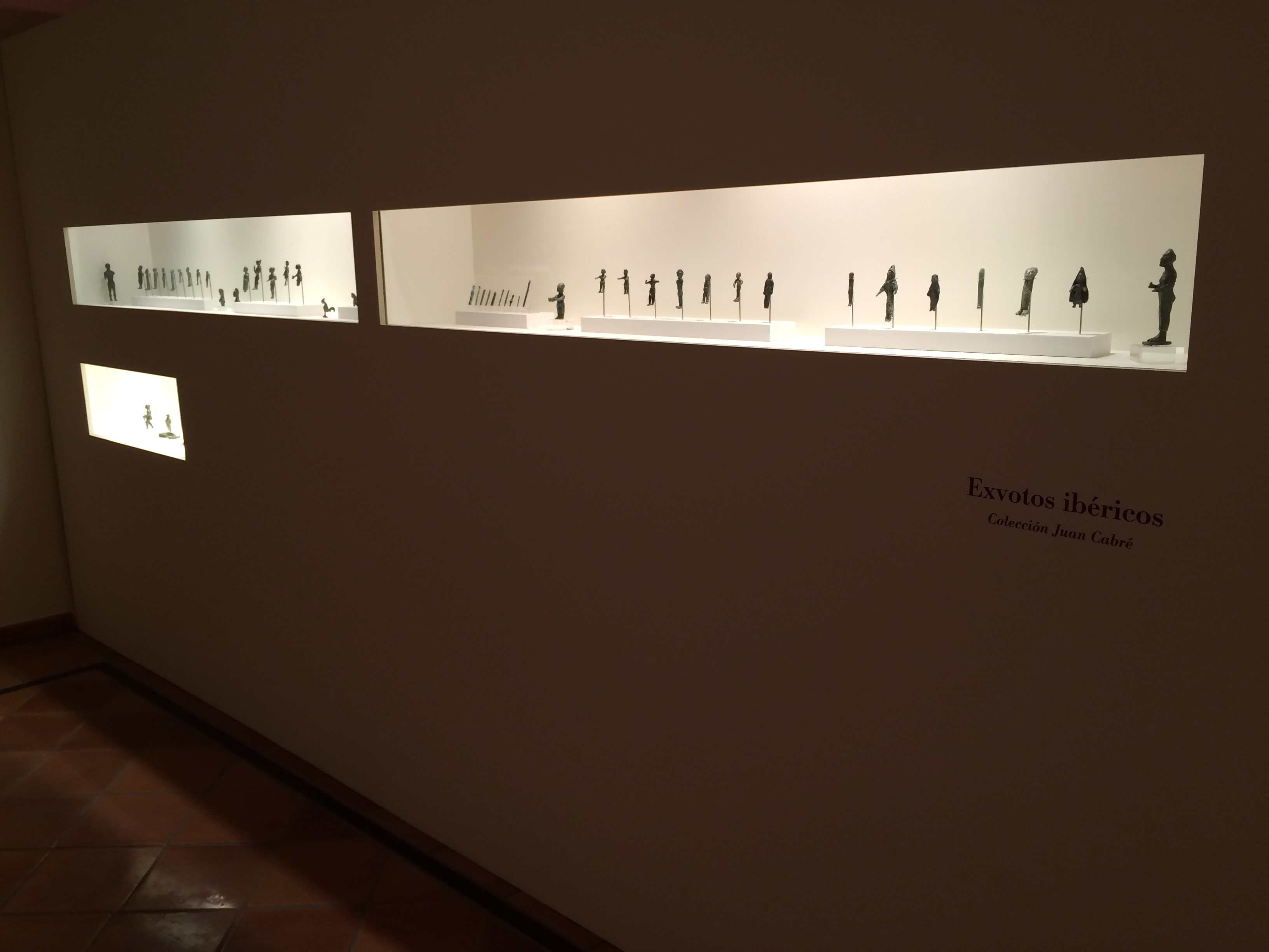 Museo Juan Cabre. Salas interiores.